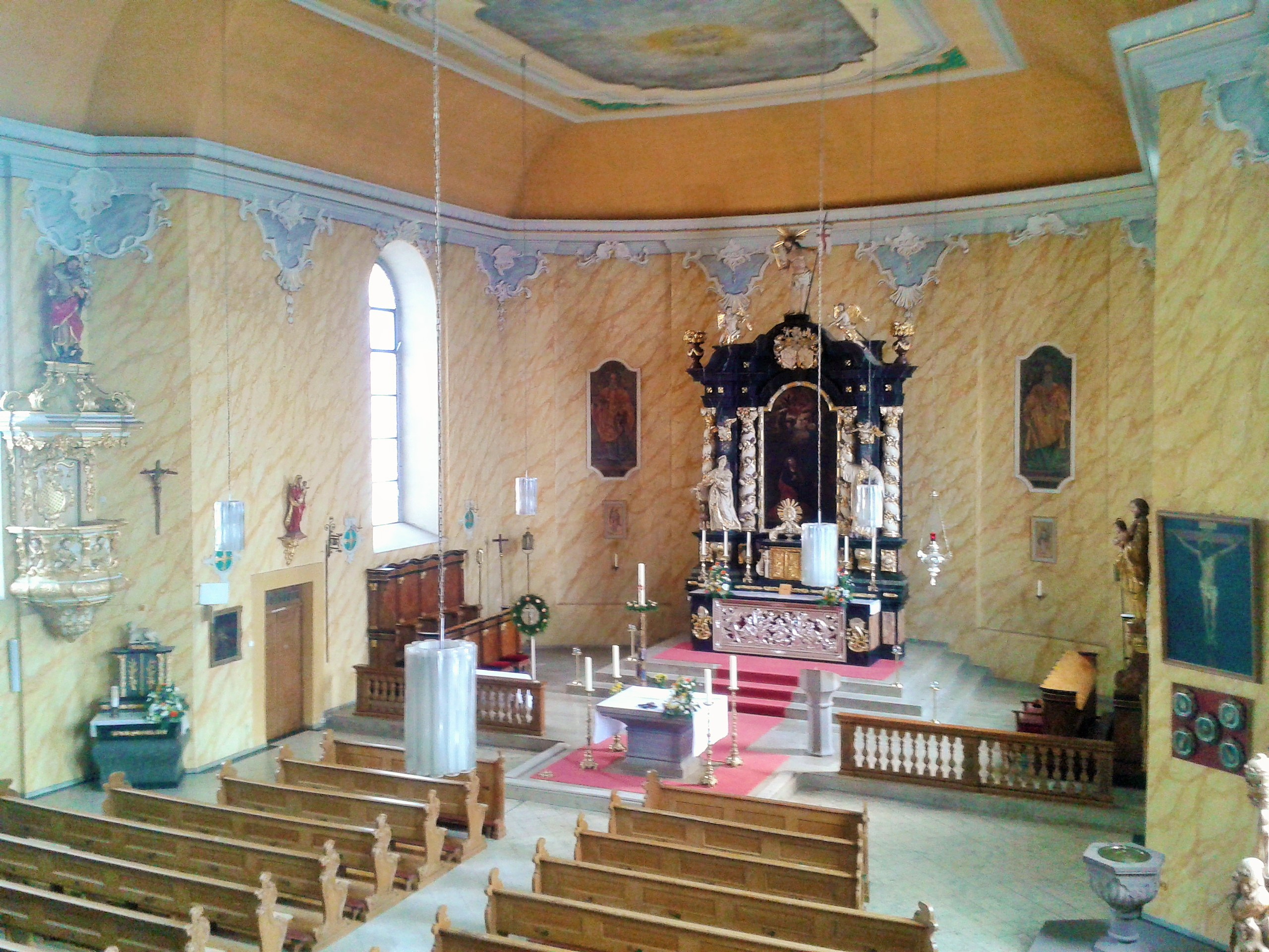 Innenraum der katholischen Sankt-Peter-und-Paul-Kirche im Flecken Lindau (Eichsfeld).